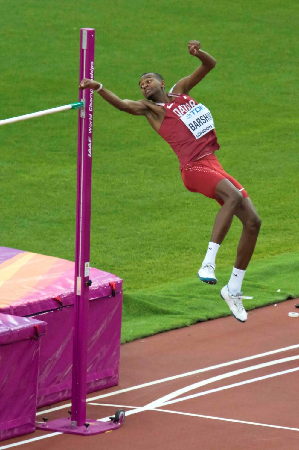 d9_3b finale hoog barshim